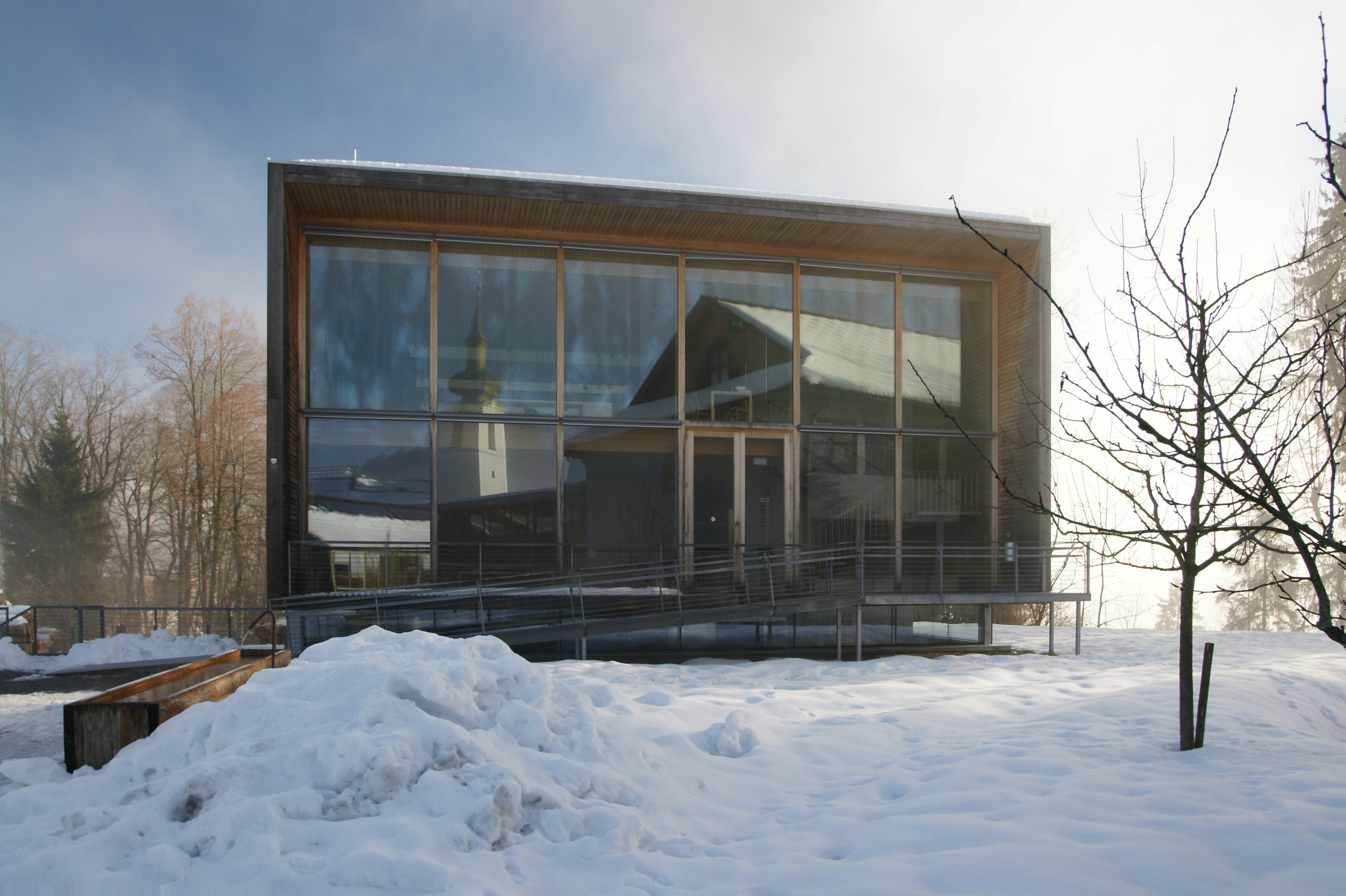 das Frauenmuseum, in Hittisau. Erbaut 2000, geplant von den ArchitektIn: cukrowicz.nachbaur (Andreas Cukrowicz, Anton Nachbaur-Sturm), Siegfried Wäger; Mitarbeit Architektur: Matthias Hein, Markus Cukrowicz.